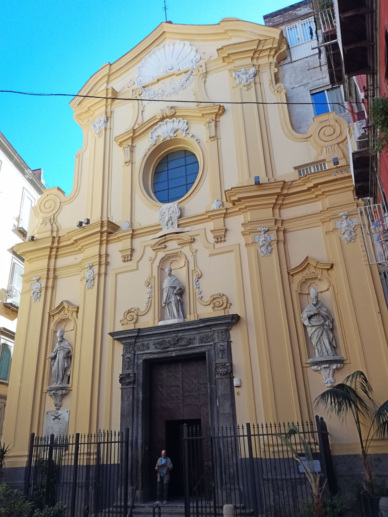 Facciata San Carlo alle Mortelle, Napoli